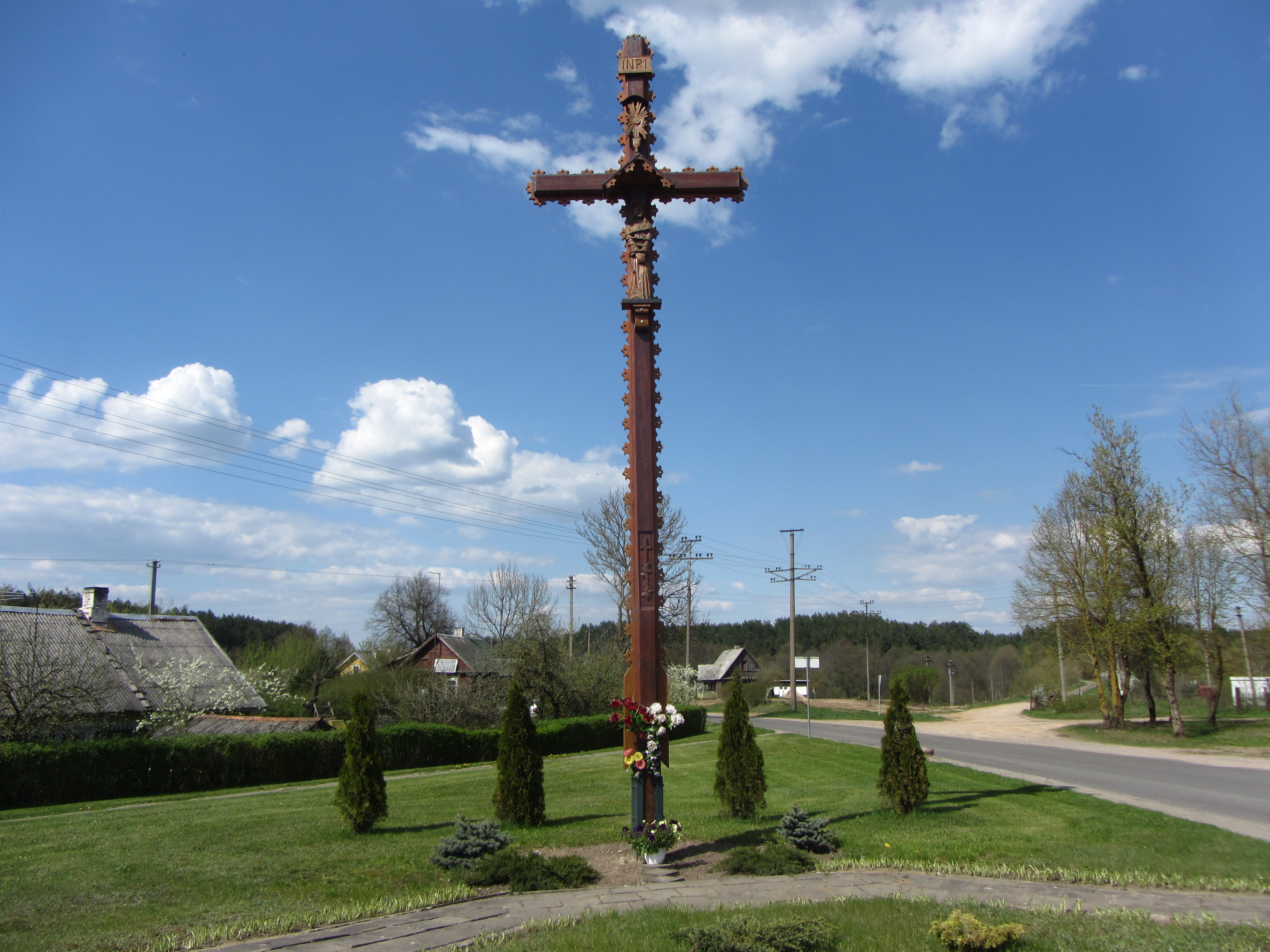 Švenčionėliai, Lithuania